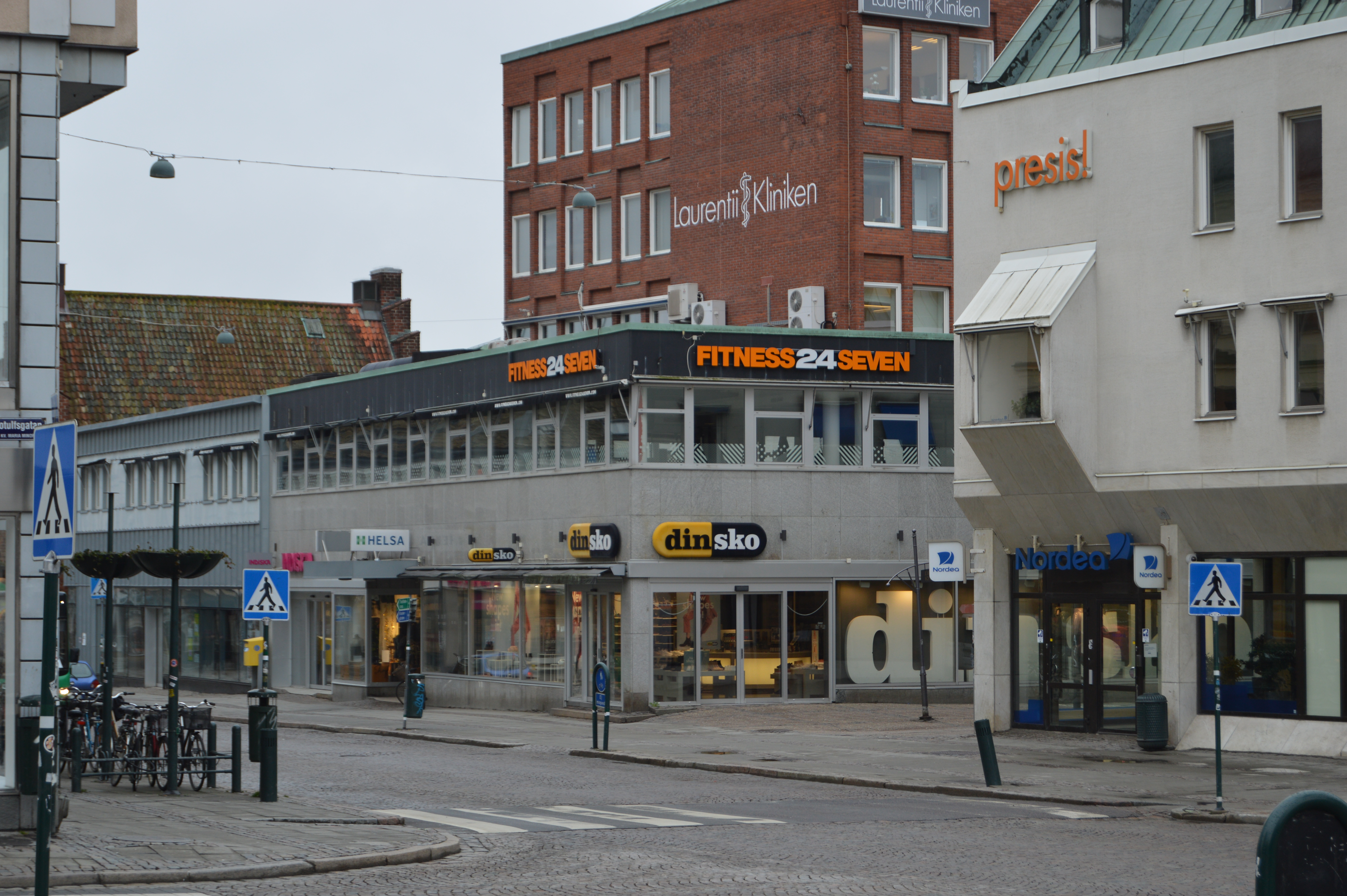 Den lägre delen av Färgaren 22 (numera en del av Färgaren 25) i Lund, där Din Sko och Fitness 24 Seven ligger.